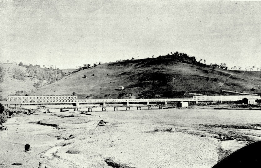 Imagen en Chile descripción física, política, social industrial y comercial de la República de Chile, por Carlos Tornero.1903